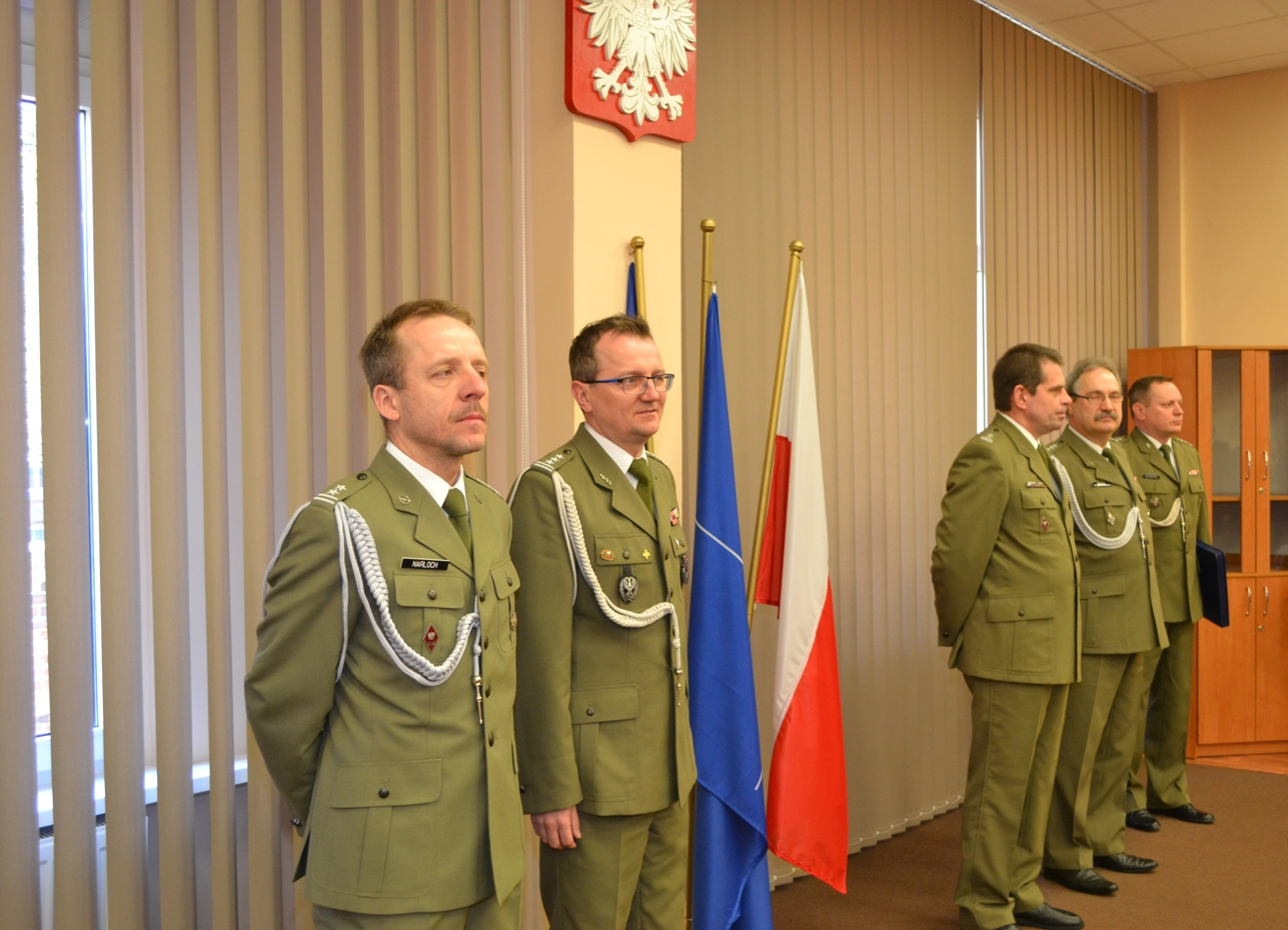 Komendant 109 Szpitala Wojskowego - od lewej ppłk Jarosław Narloch